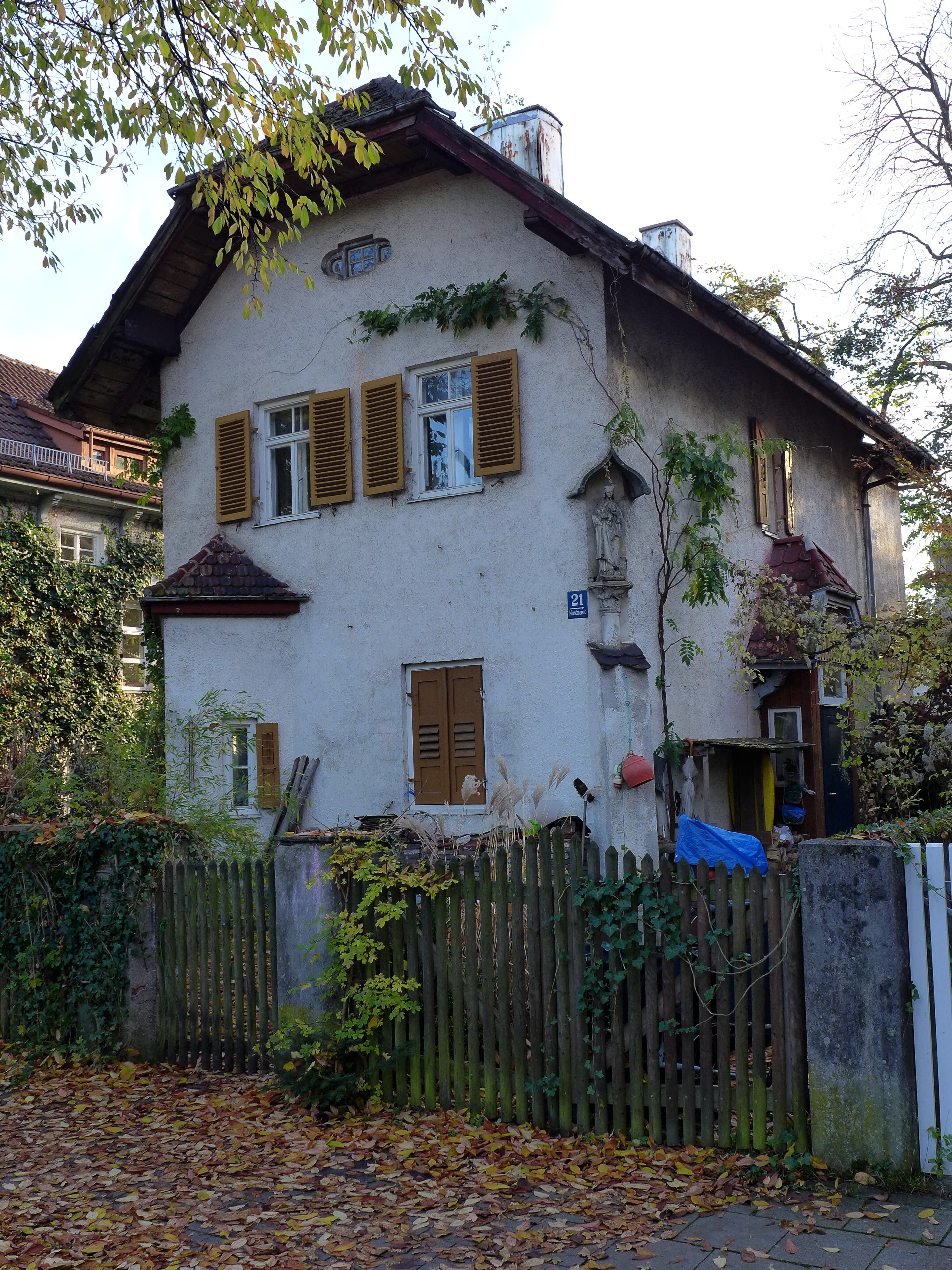 Marschnerst 21, München